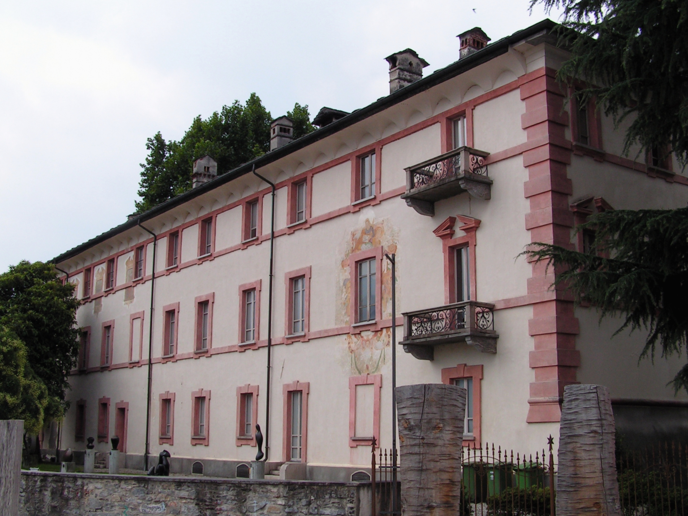 Via Bartolomeo Rusca 5, Locarno. Casorella. Vue générale, façade sud-est.